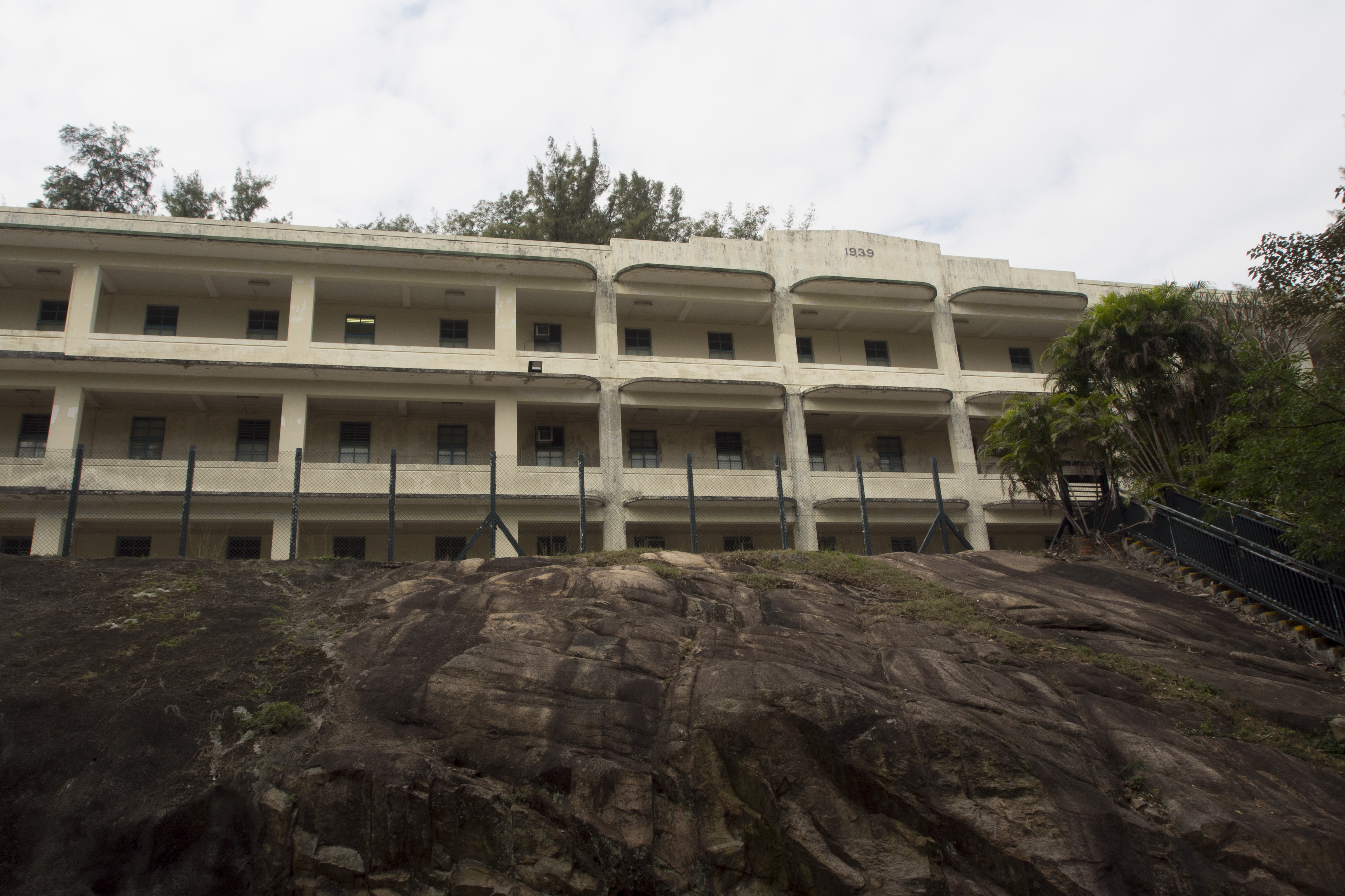 中文（香港）: 位於第4座斜對面、只漆有1939字樣的建築物 Lyemun Barracks Block 03